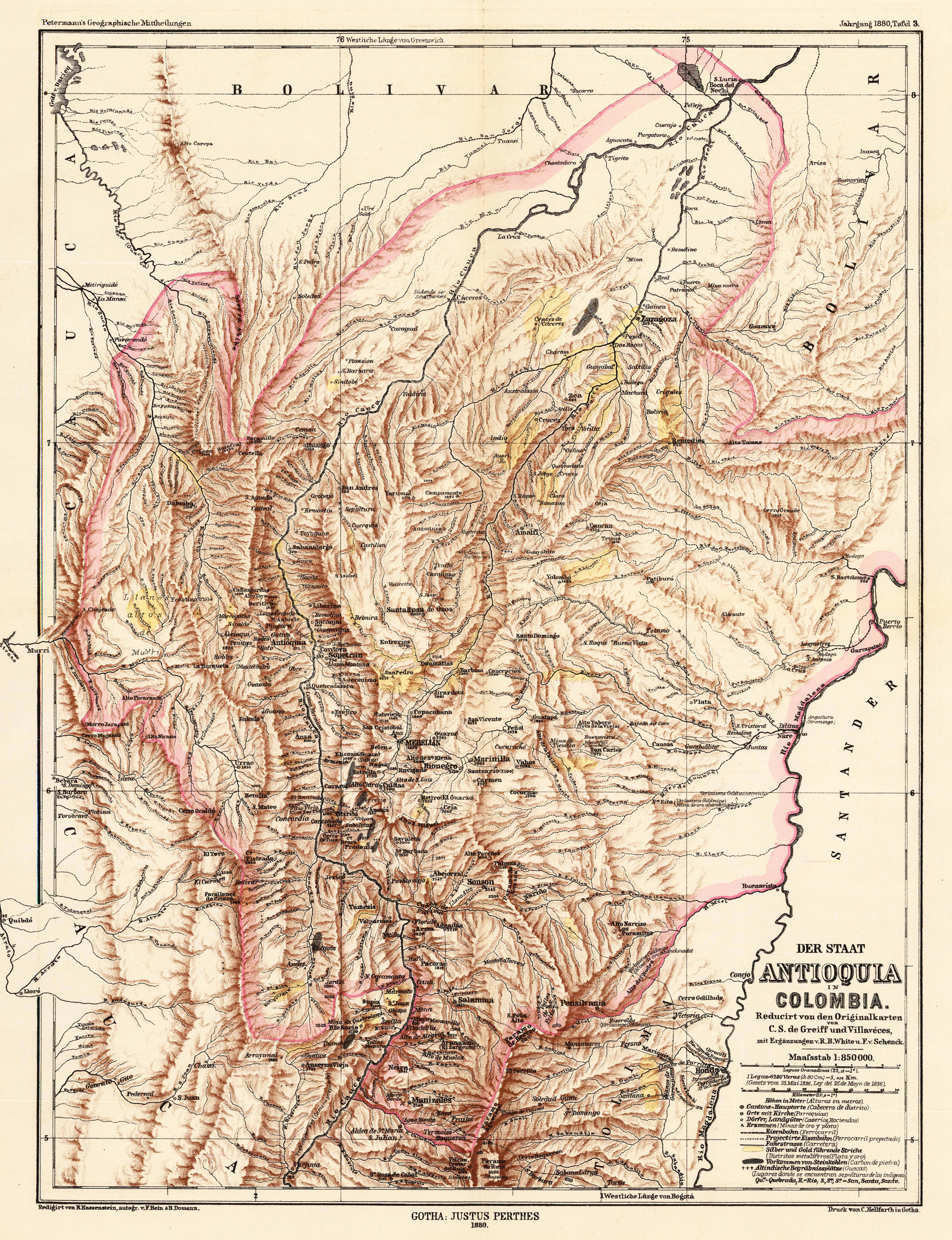 Der Staat Antioquia in Colombia